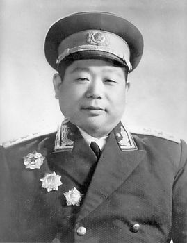 陈锡联上将，中国人民解放军开国上将。